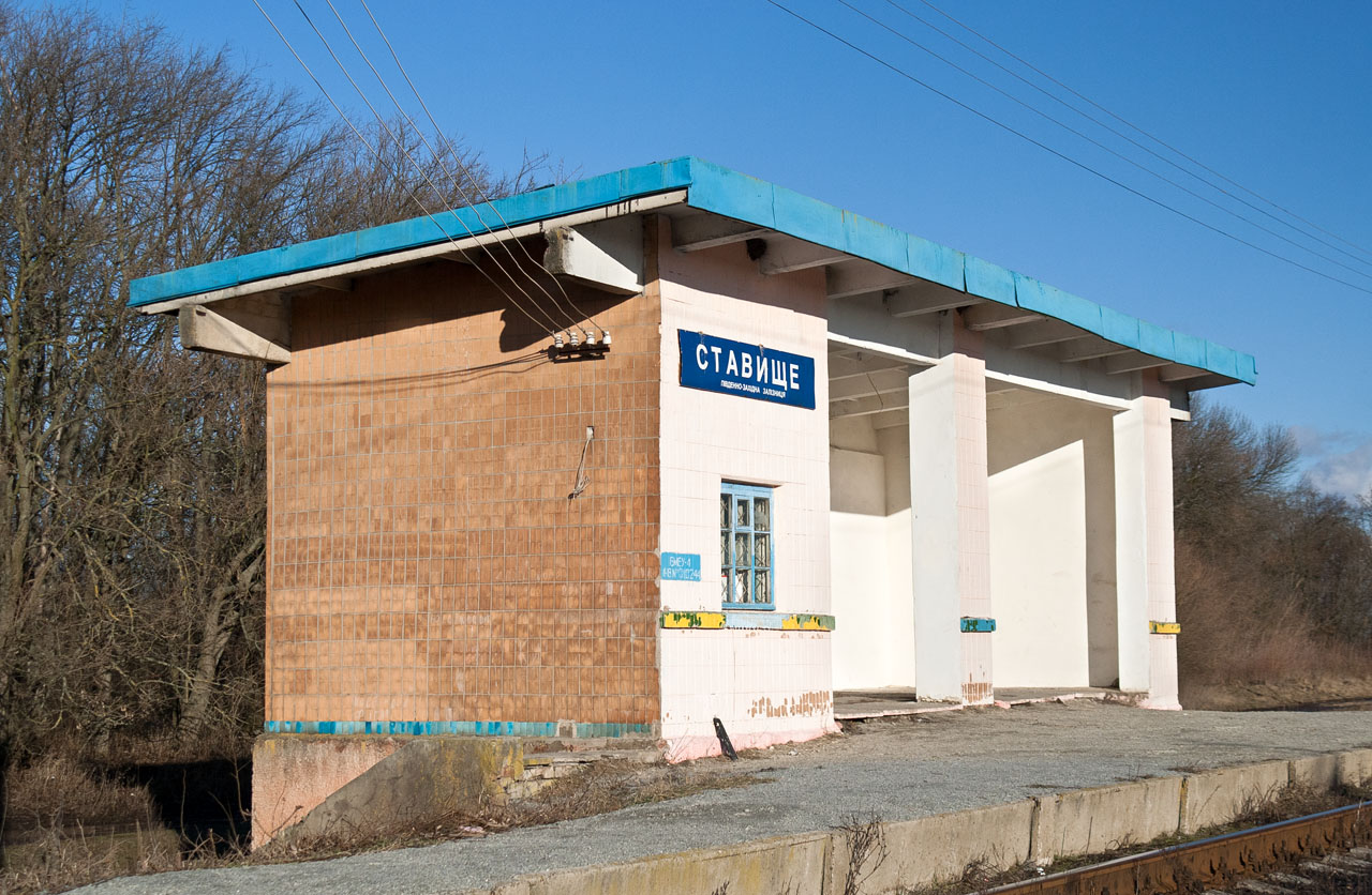 Пасажирський павільйон